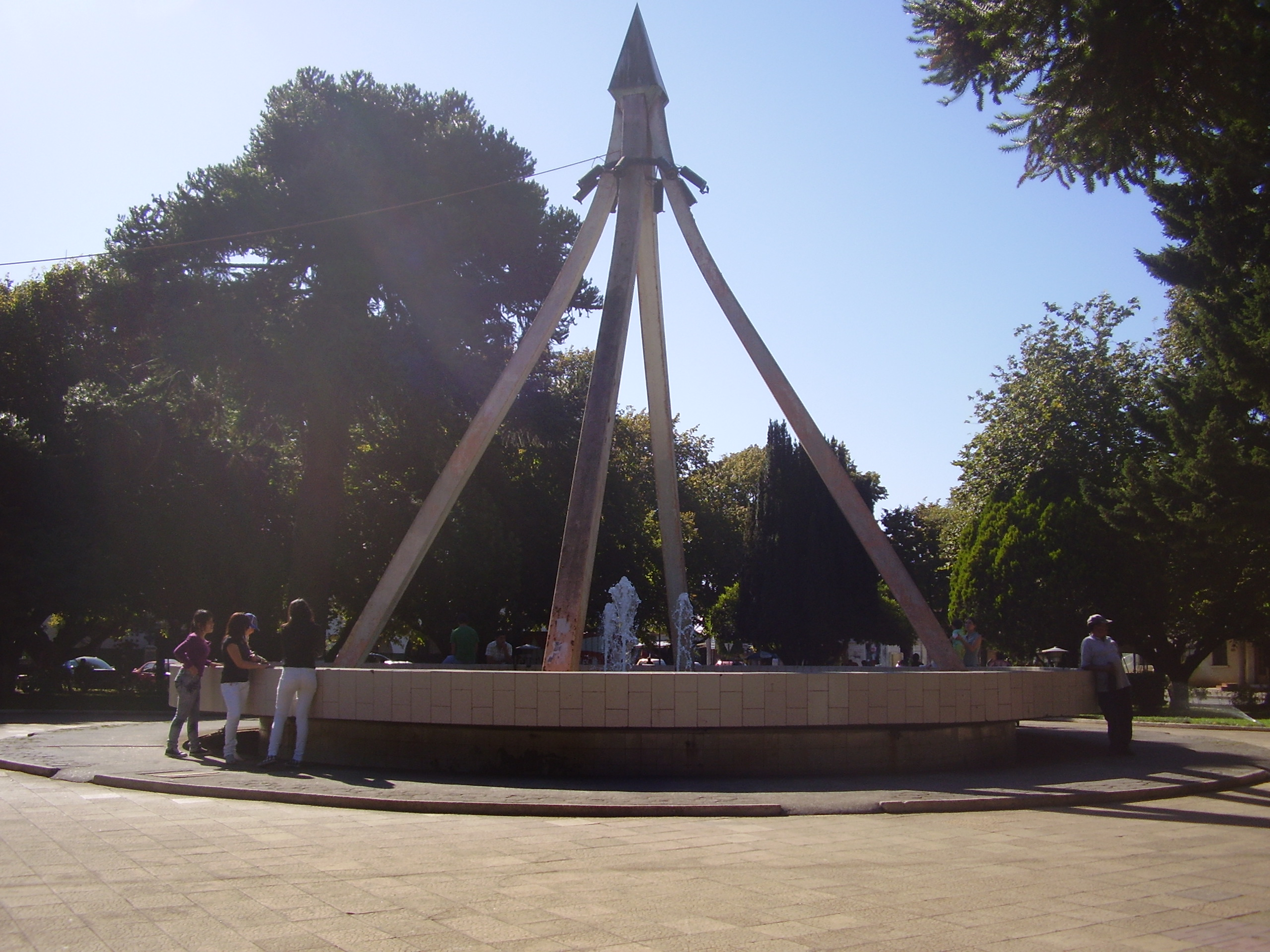 Pileta de la Plaza de Armas de Cañete, Chile